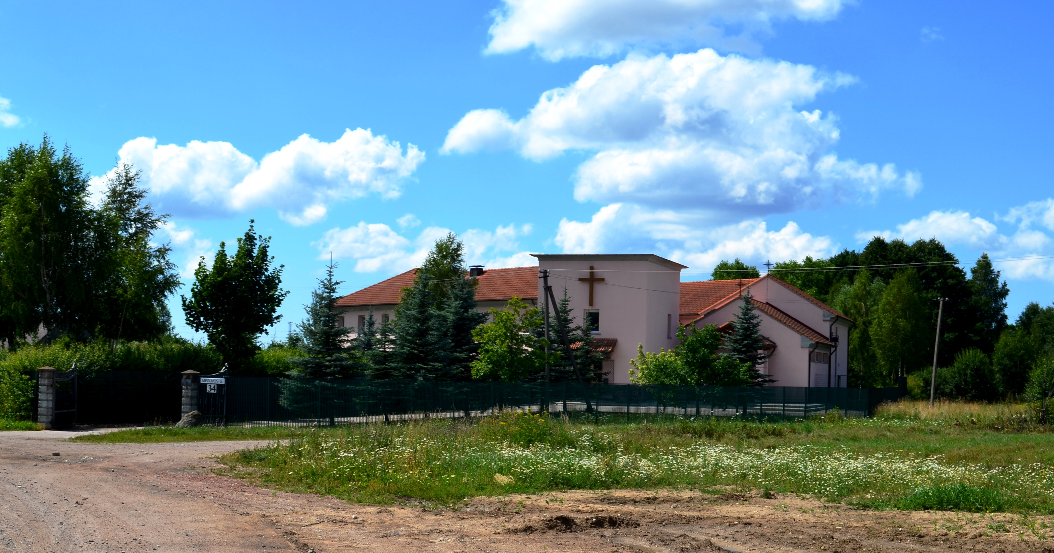 Kretingos šv. Klaros moterų vienuolynas